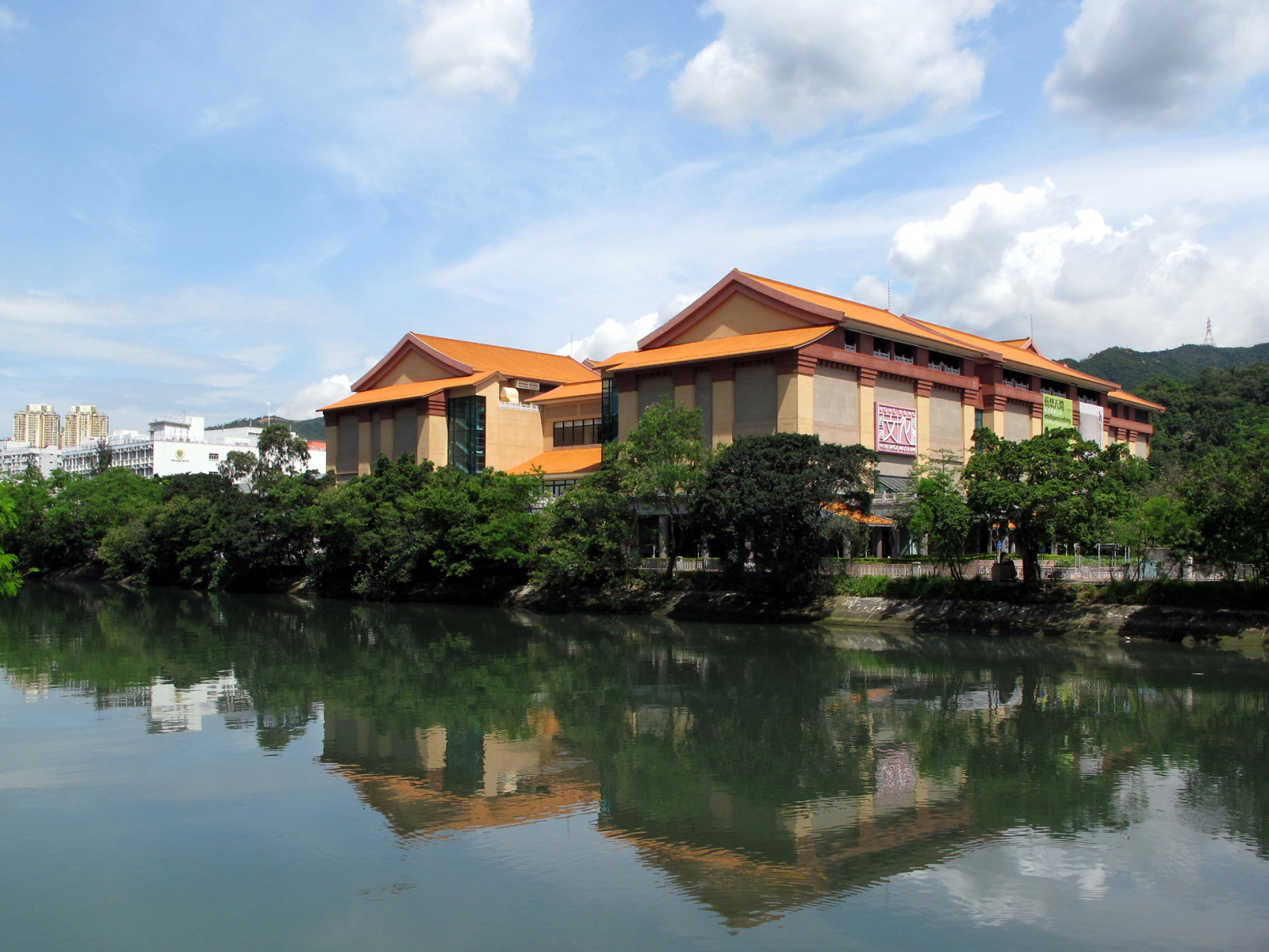 Hong Kong Heritage Museum 香港文化博物館